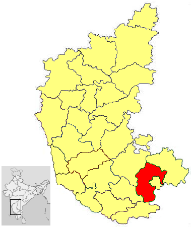 district in Karnataka